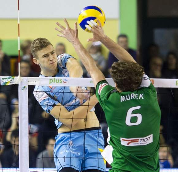 Bartłomiej - polski siatkarz. 2013/14